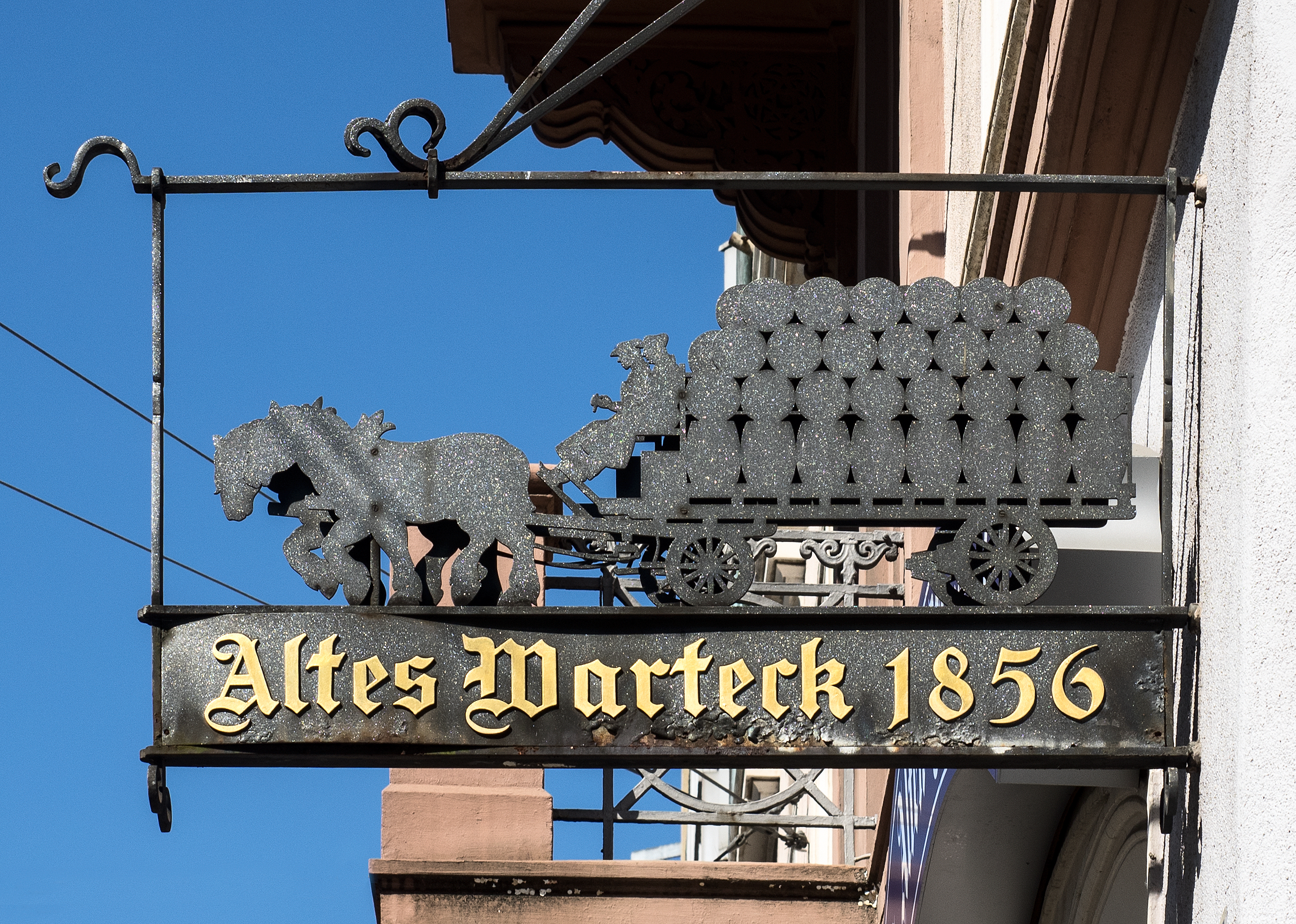 Wirtshausschild zum alten Warteck